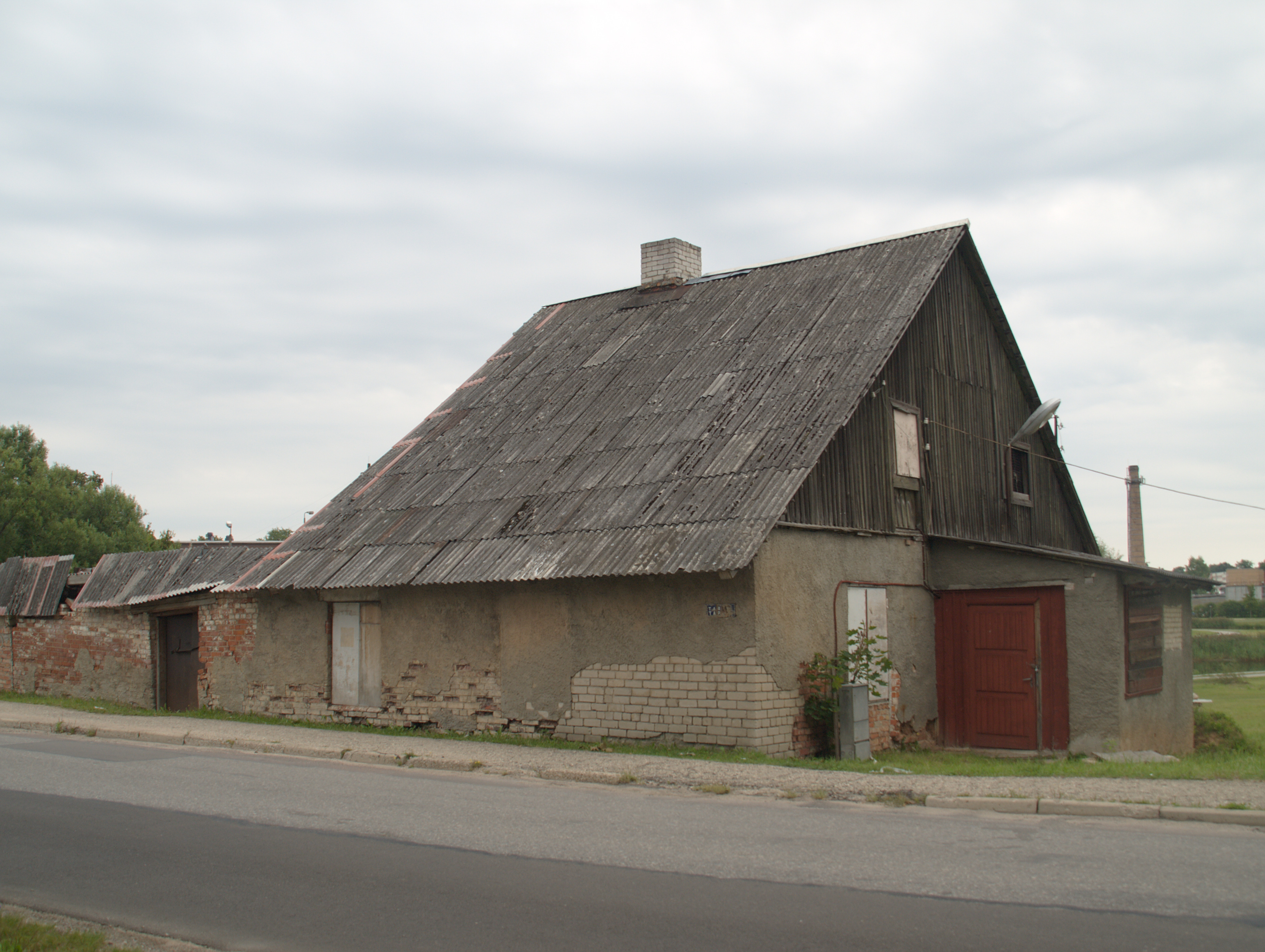 Ramsi vesiveski